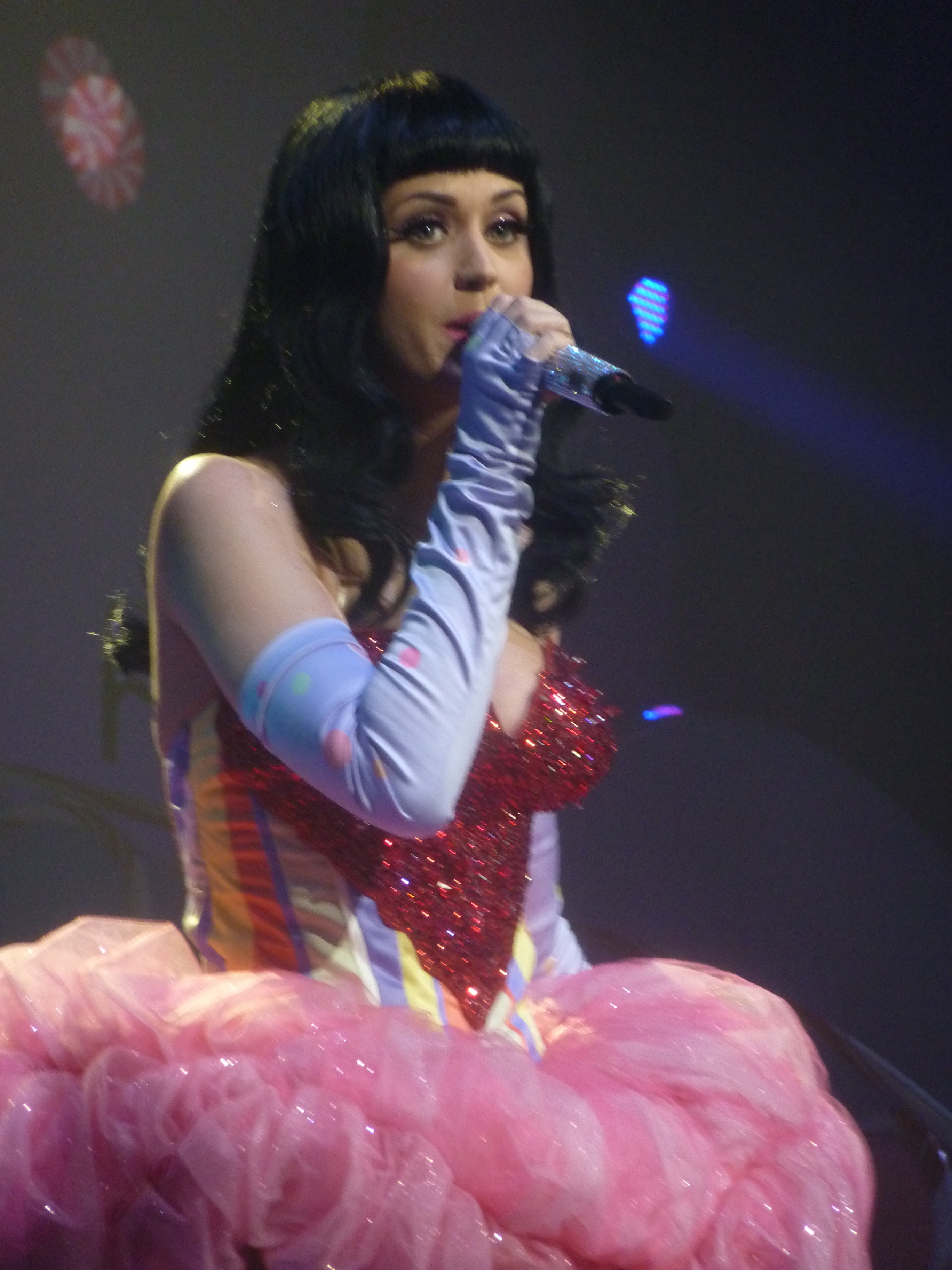 Photos de Katy Perry en concert au Zenith de Paris en mars 2011 dans le cadre de sa tournée " California Dreams Tour "